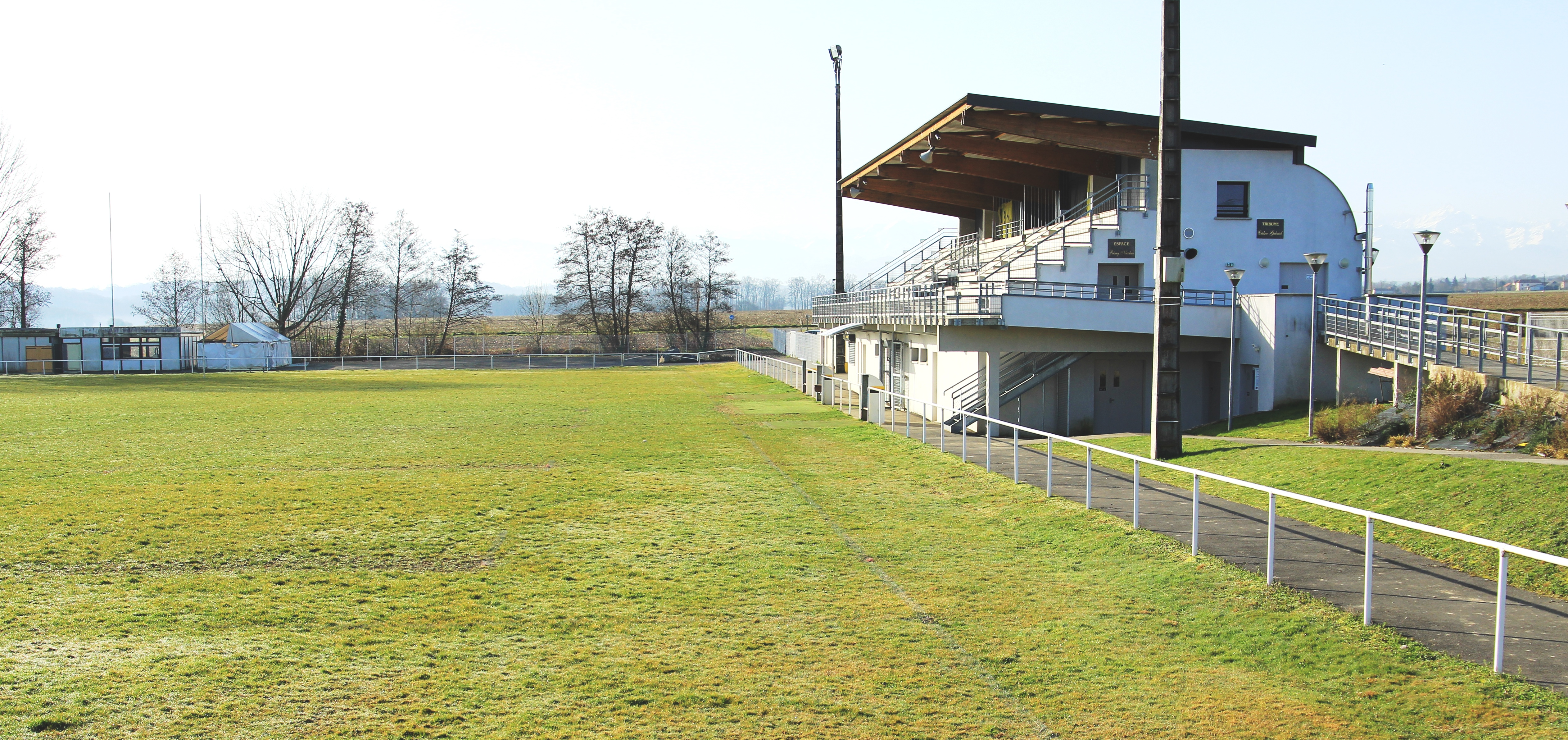 Stade de rugby de Pouyastruc (Hautes-Pyrénées)